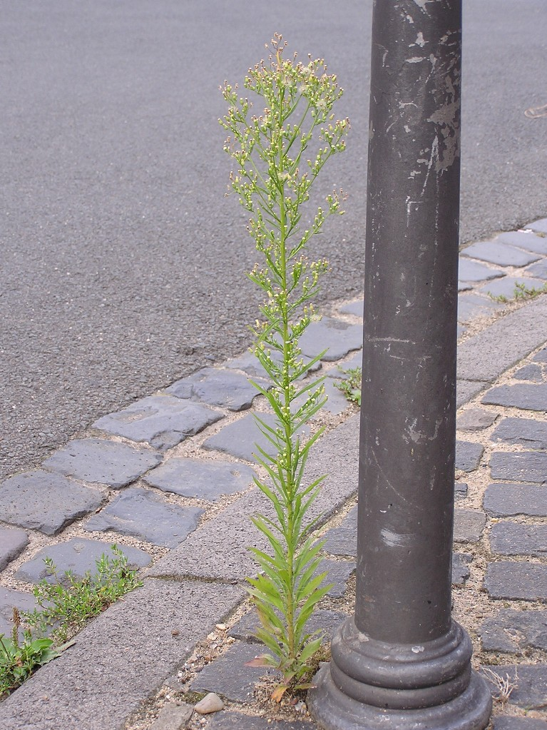 Conyza canadensis am Straßenrand in Bonn-Beuel.